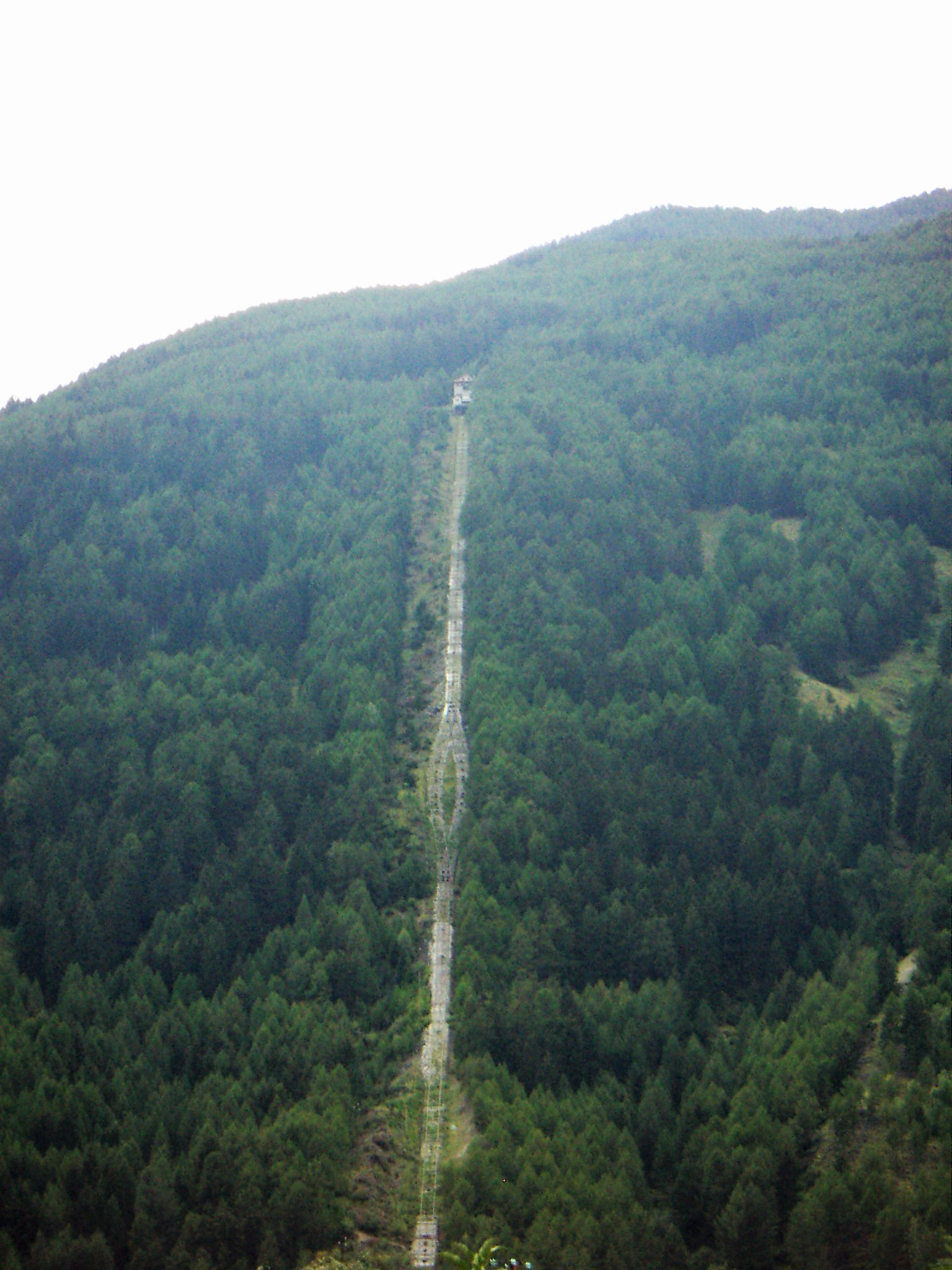 Miniere di Lasa, Alto Adige, Italia.